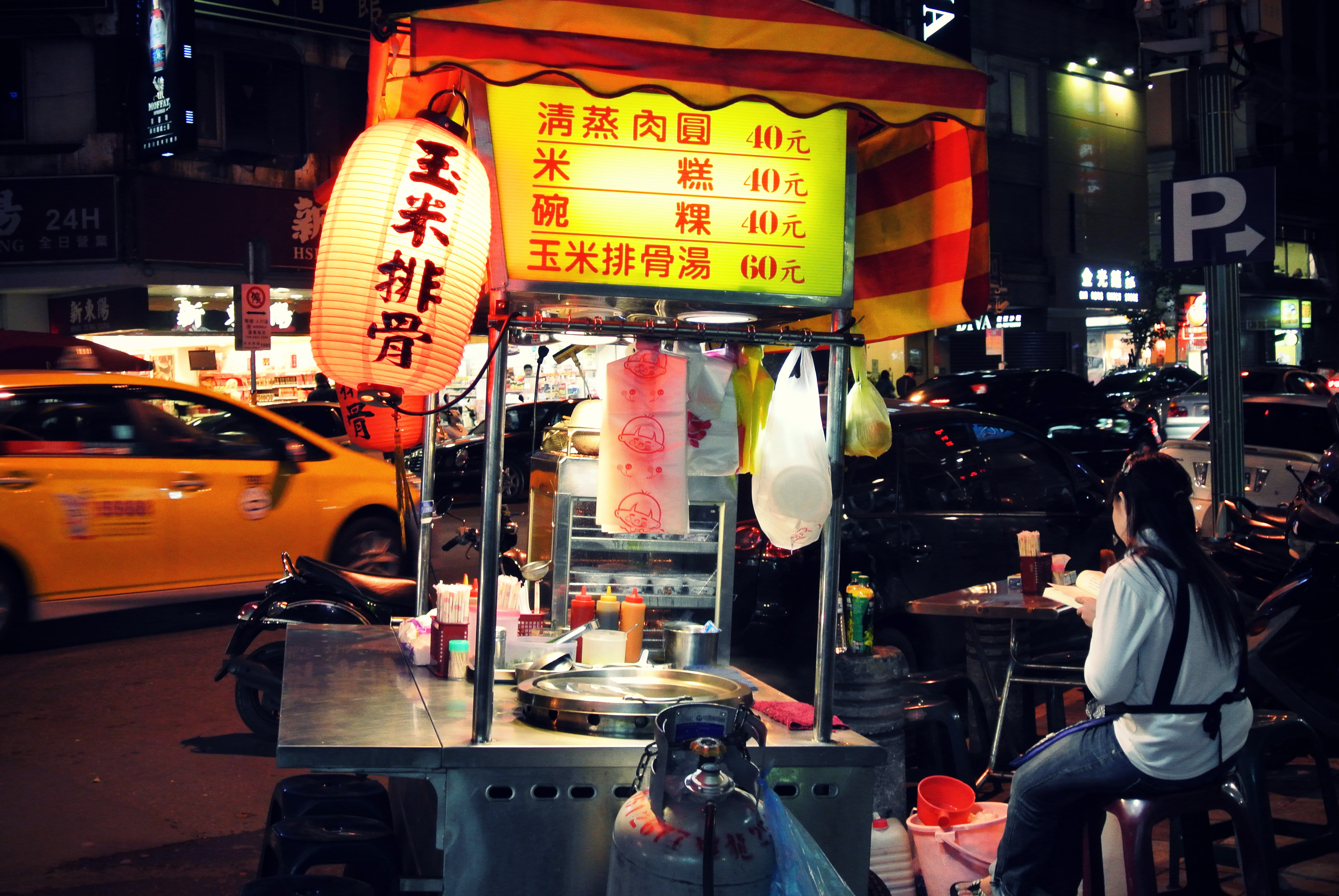 玉米排骨読書女 Nikon 1 J1 + 1 Nikkor VR 10-30mm f/3.5-5.6